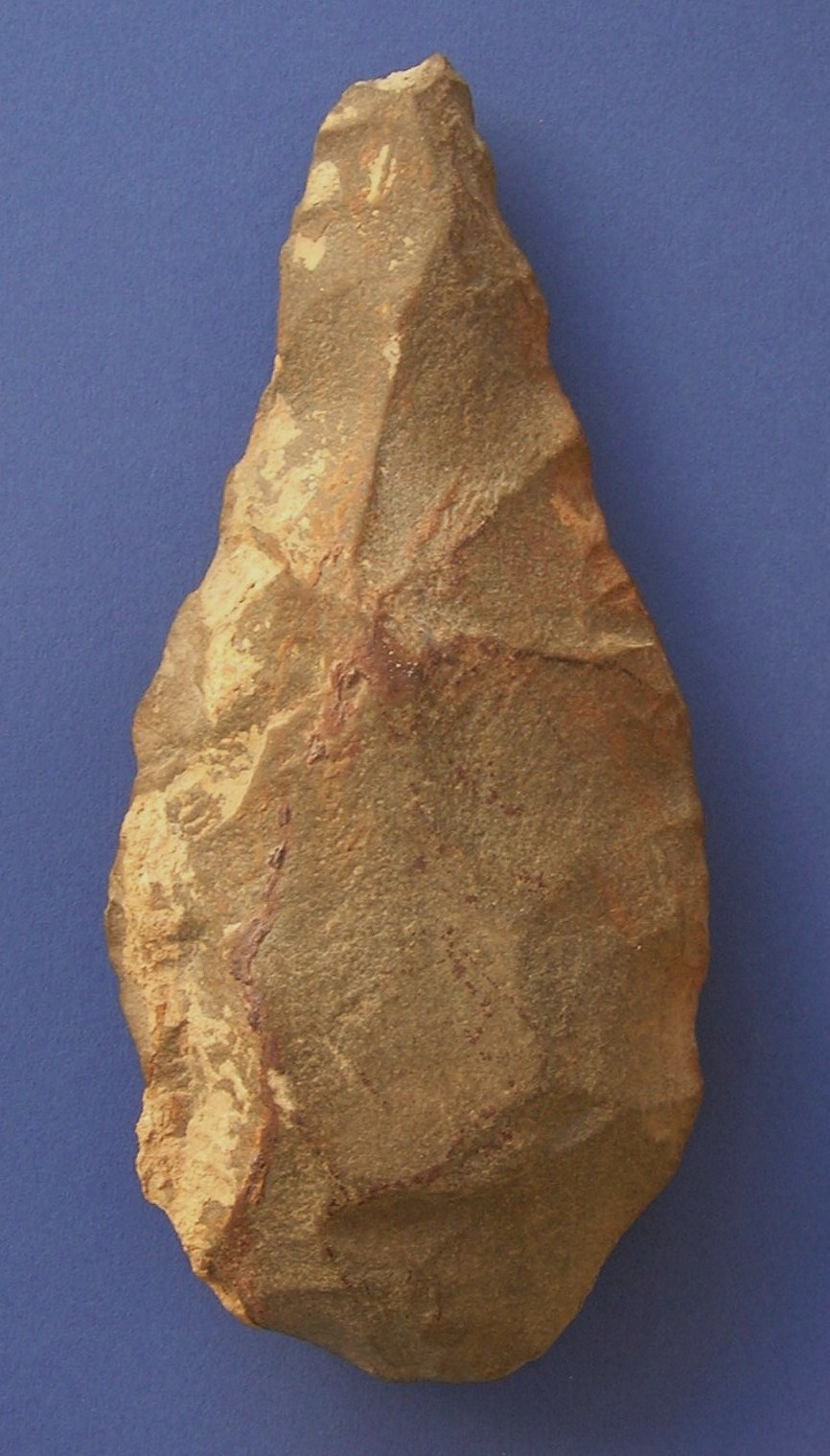 Biface préhistorique, Sour El-Ghozlane (Algérie), chemin de la pépinière (trouvé autour de 1980)